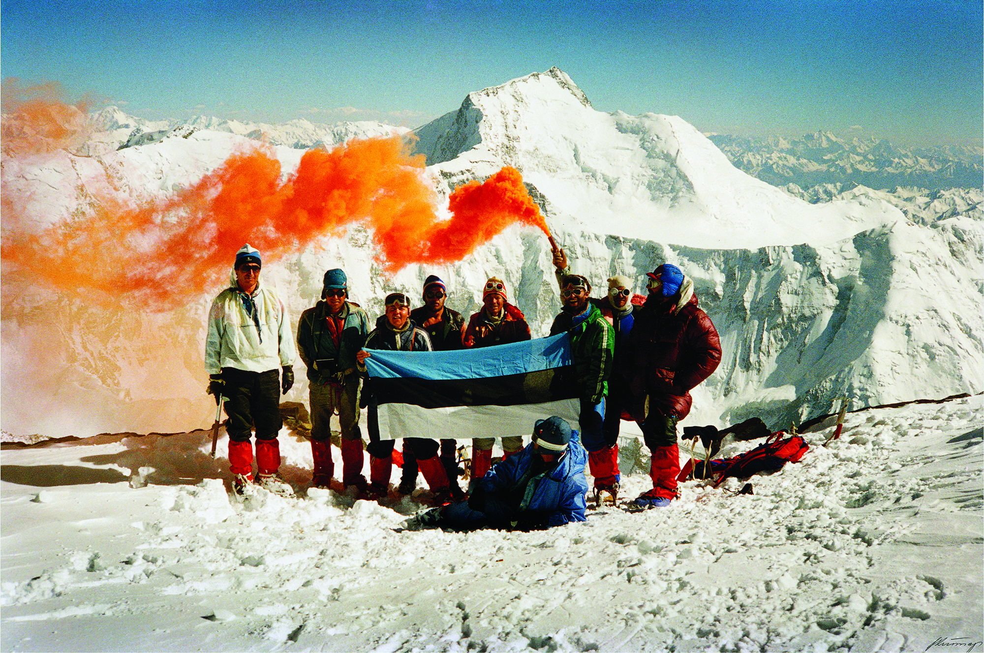 Korženevskaja mäetipp Kommunismi taustal. 90